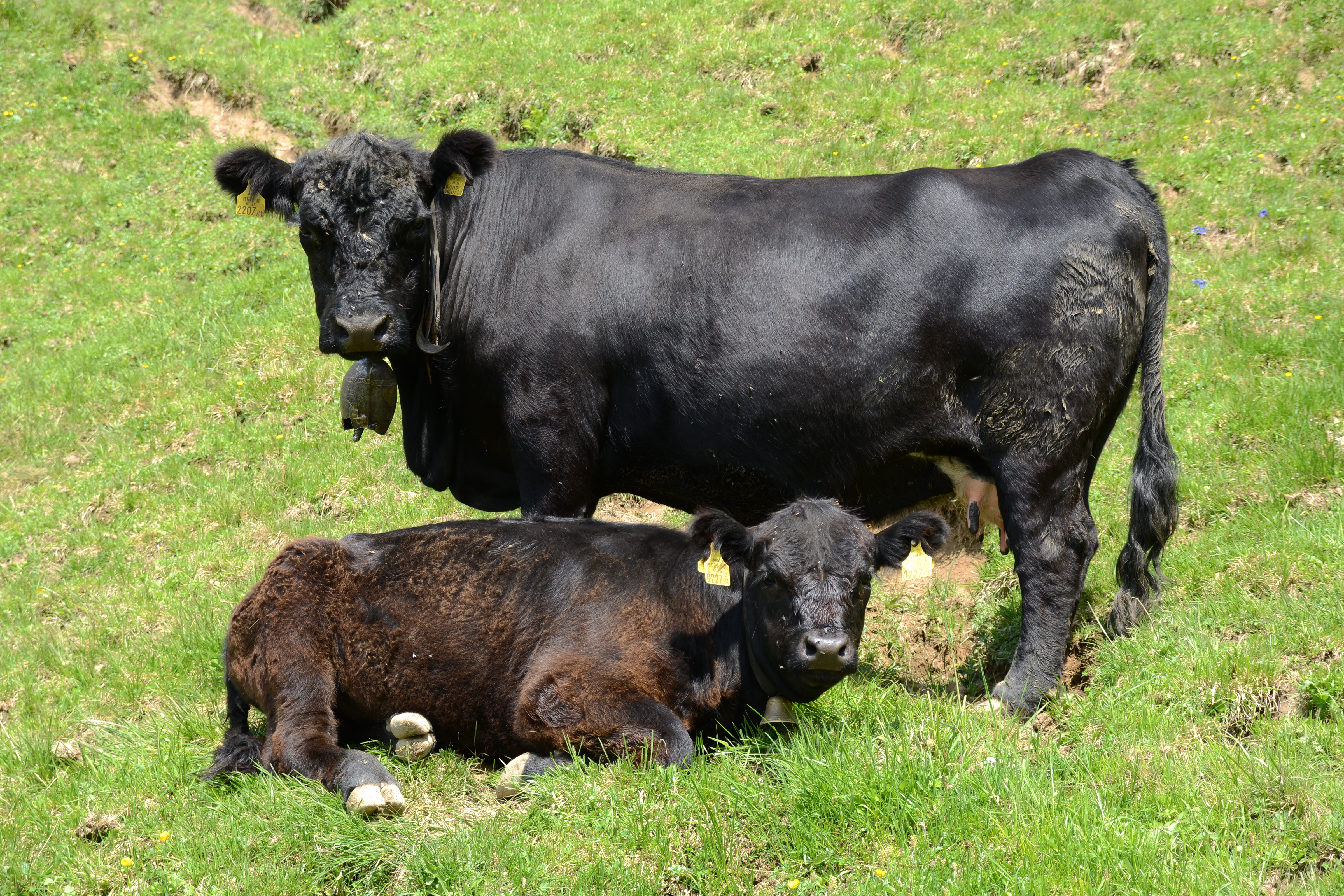 Aberdeen Angus im Gadental an den Steilhängen des Muttawangjoch oder auch Mutterwangjoch genannt.